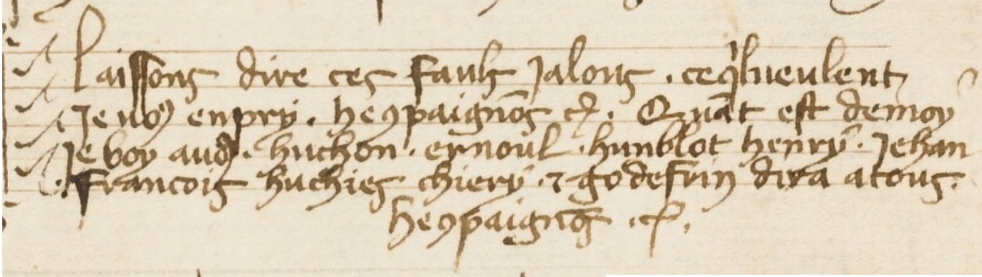 Ausschnitt aus Guillaume Dufays Rondeau He compaignons: Text von Strophe 2 und 3.